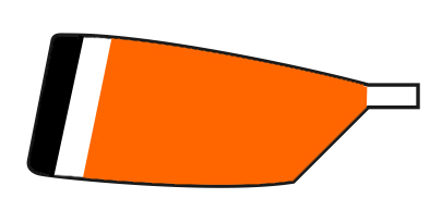 Blad van Roeivereniging RIC Amsterdam